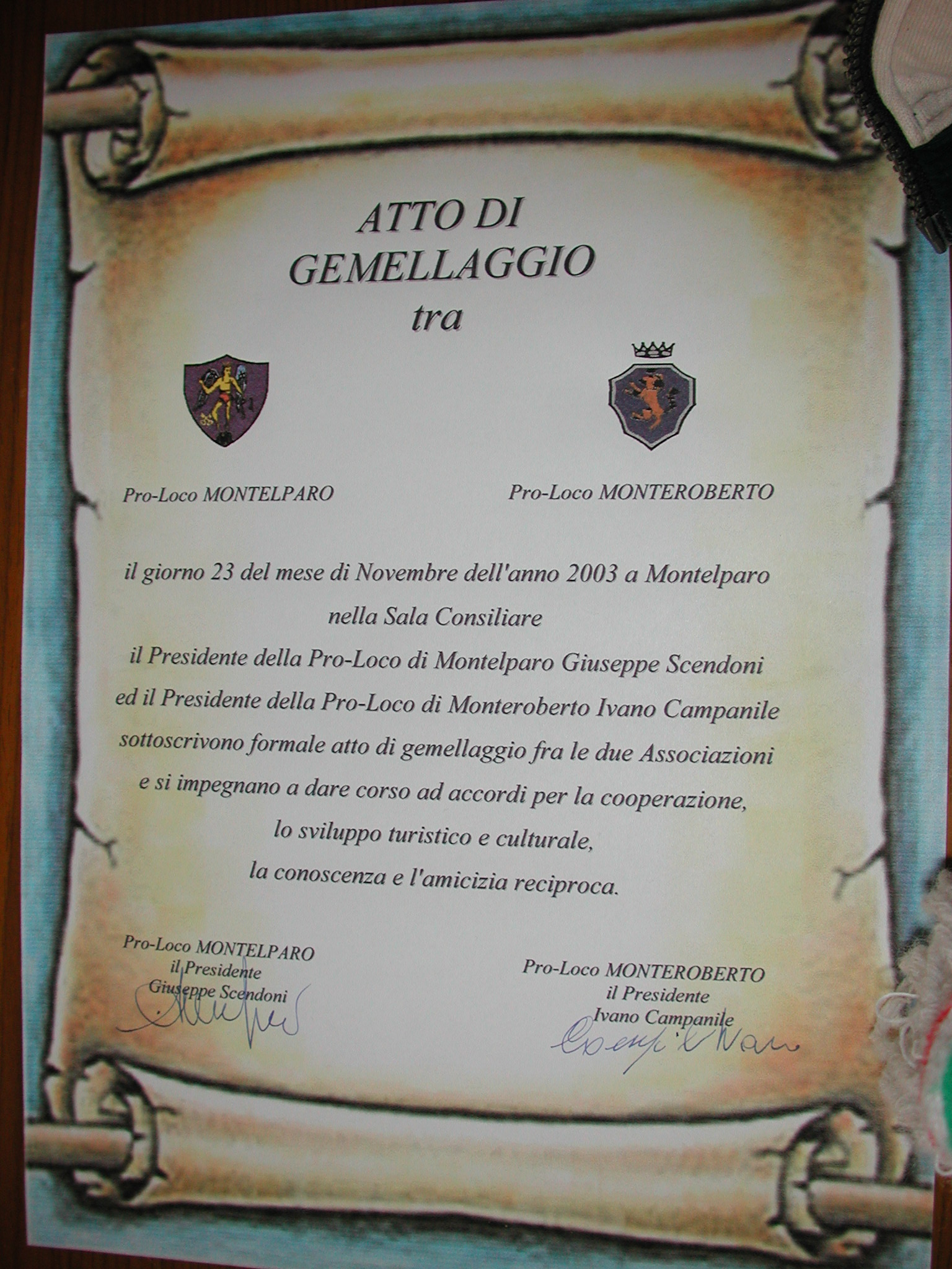 Atto di gemellaggio tra Monte Roberto e Montalparo